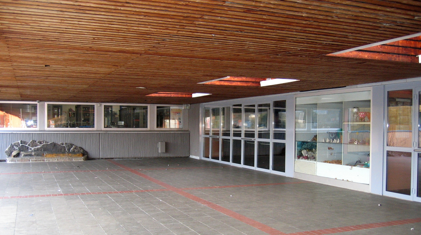 Märkisches Gymnasium, Am Hemberg in Iserlohn (Eingang zum Hemberg-Museum).